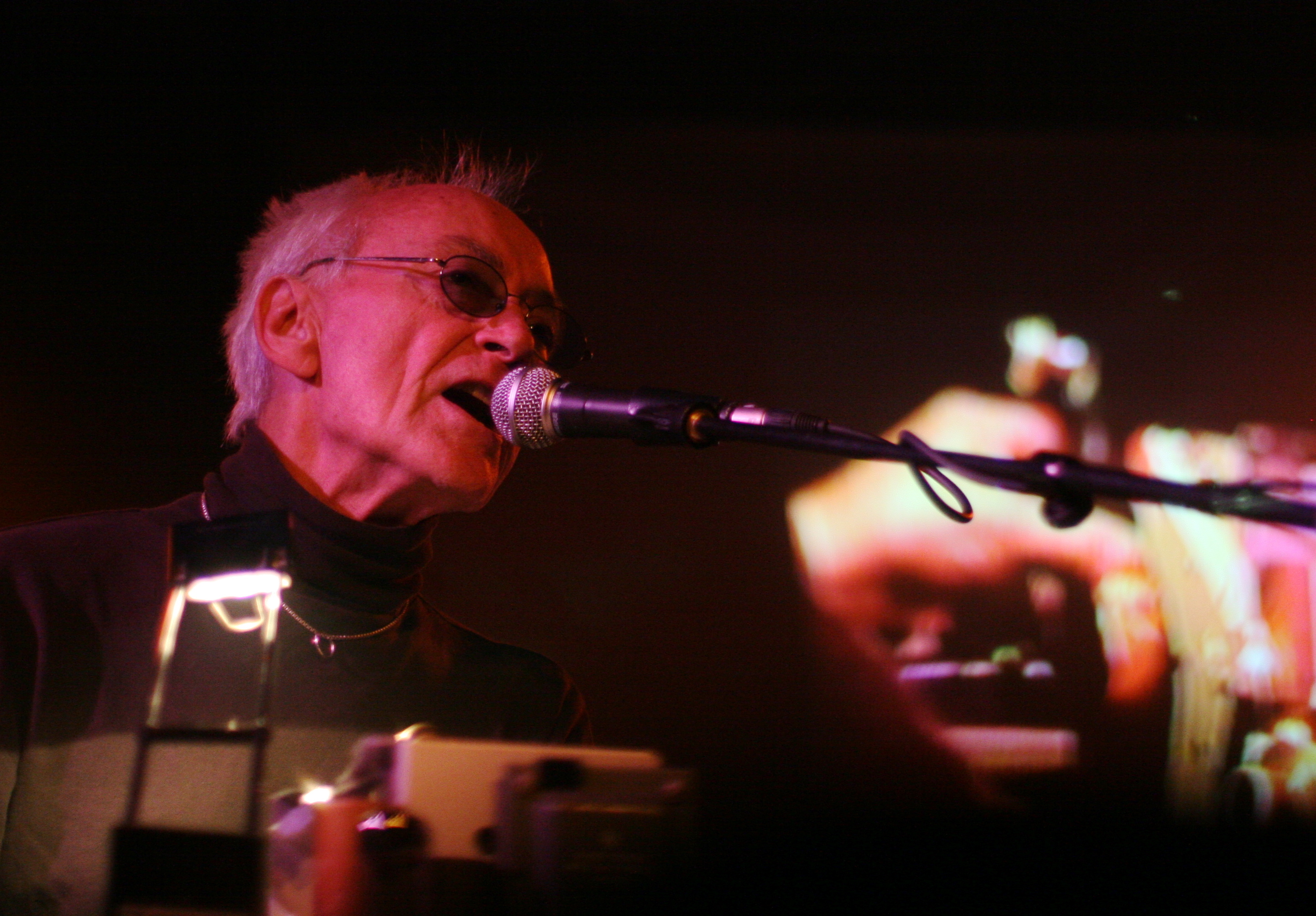 Silver Apples à Barcelona, Salle Apolo La